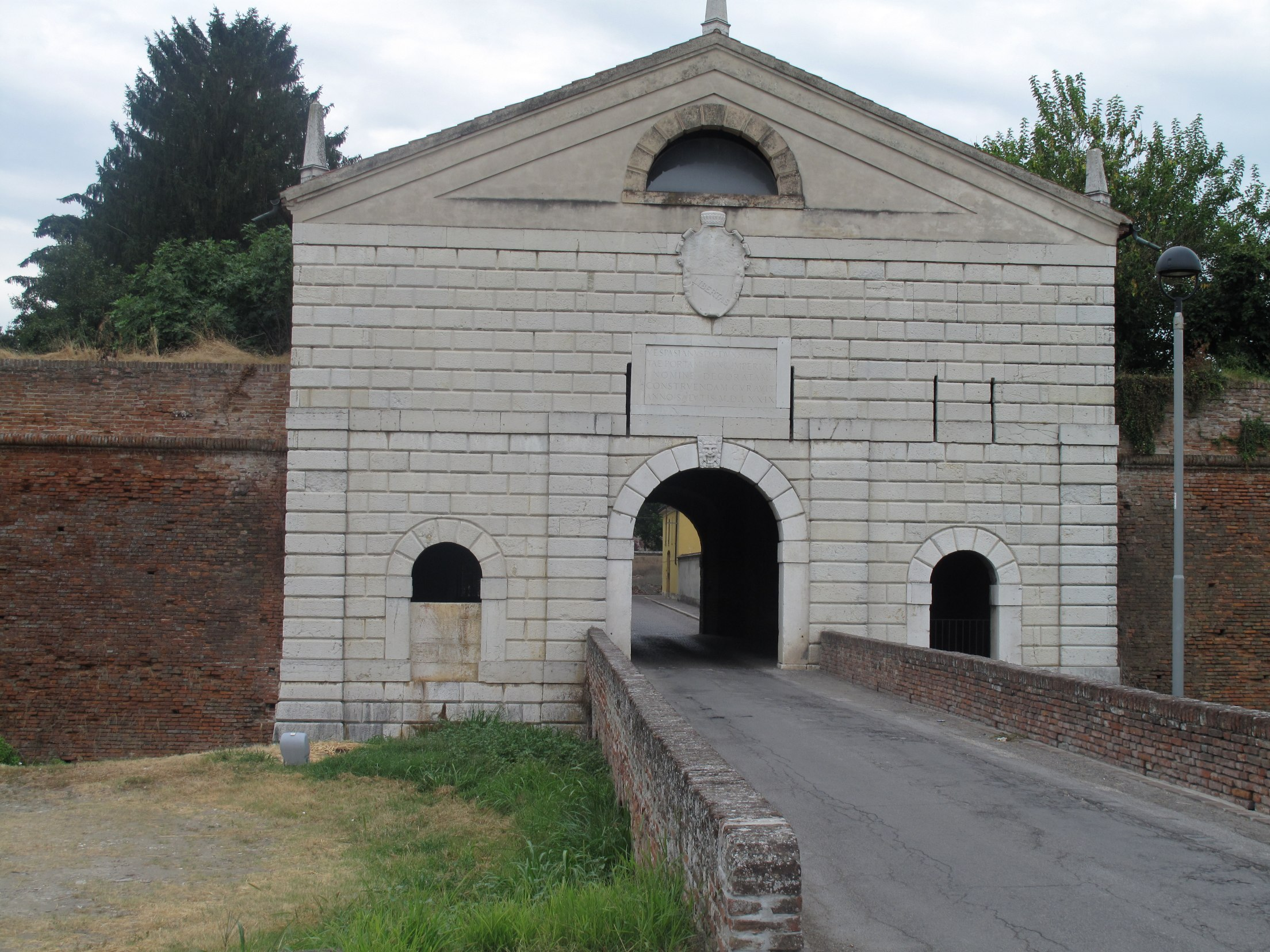 visite juillet 2010